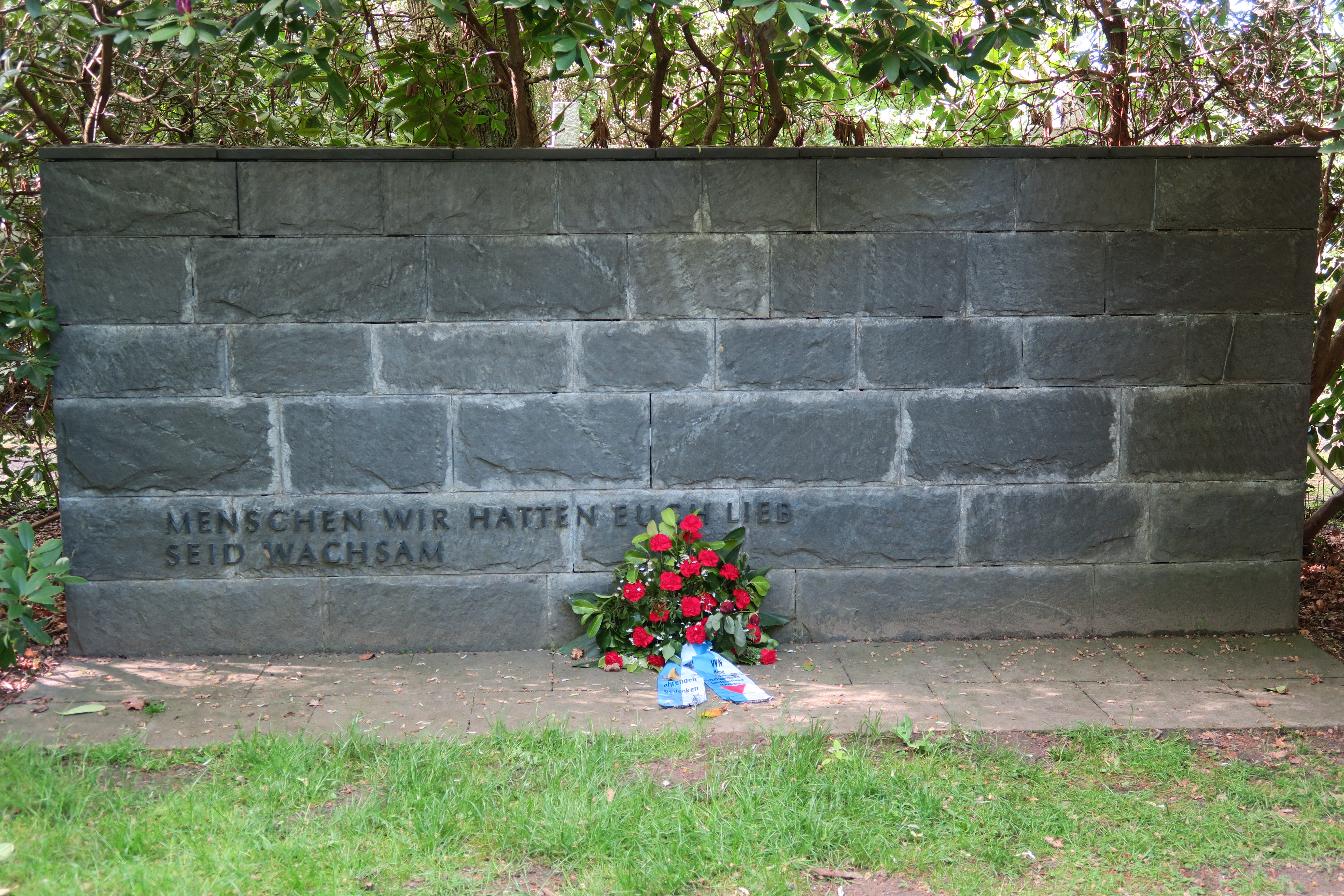 Ehrenhain der Hamburgischen Widerstandskämpfer auf dem Friedhof Ohlsdorf in Hamburg